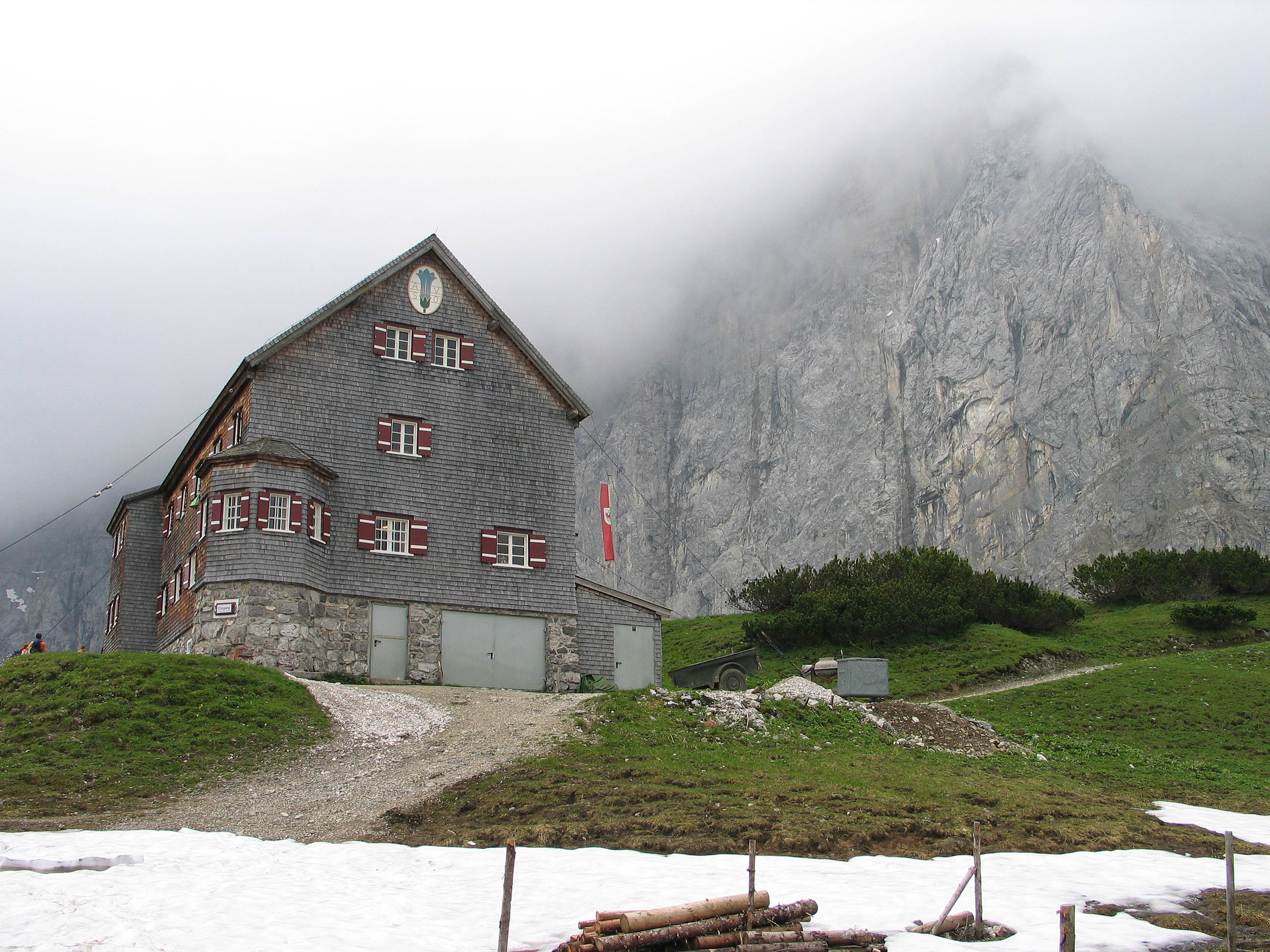 Die Falkenhütte vor der Herzogkante, Karwendel Photograph: Luidger (18. Juni 2005)